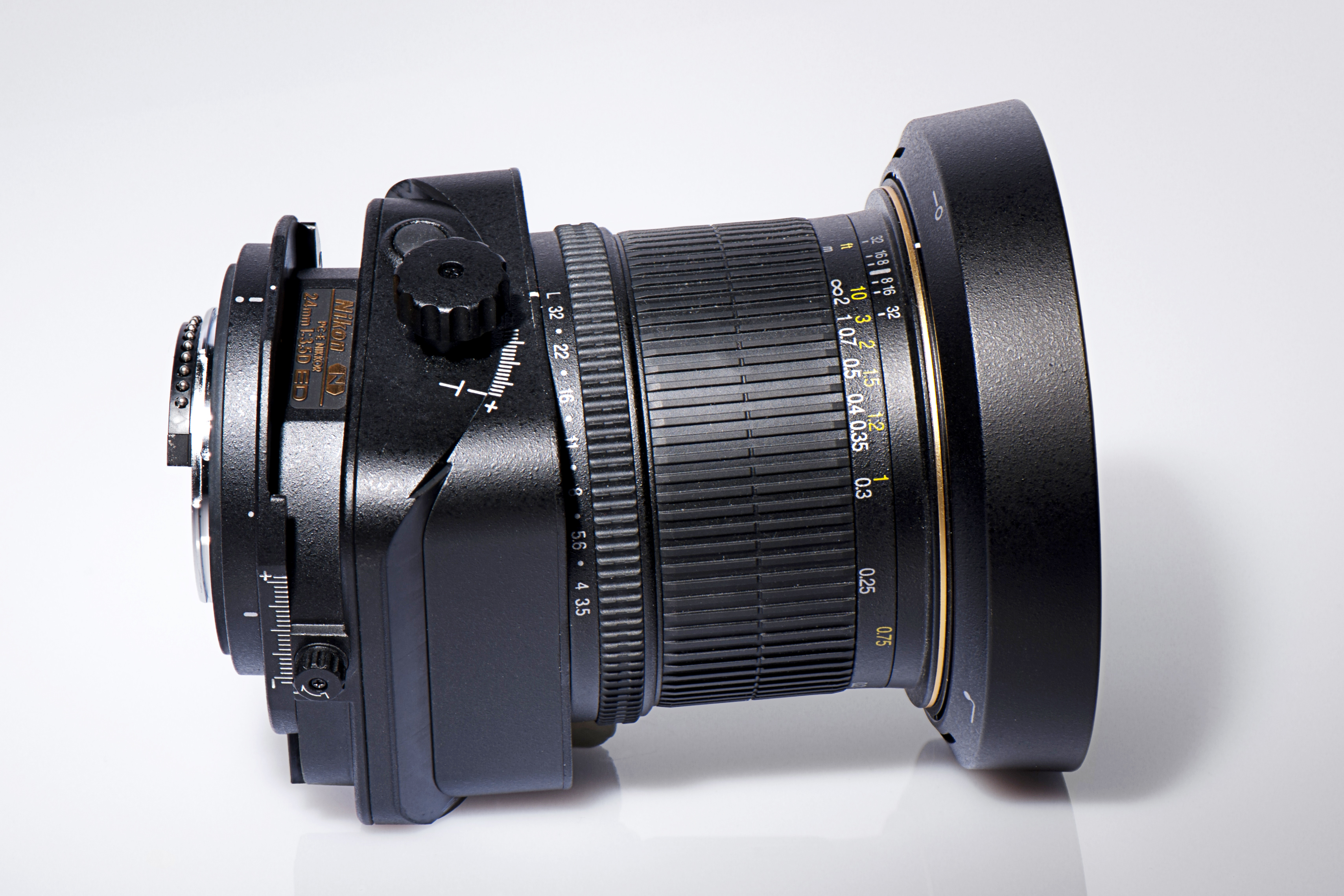 Ein PC-E Objektiv von Nikon in Tilt-Shift Einstellung (Brennweite 24 mm, Blende 3.5)